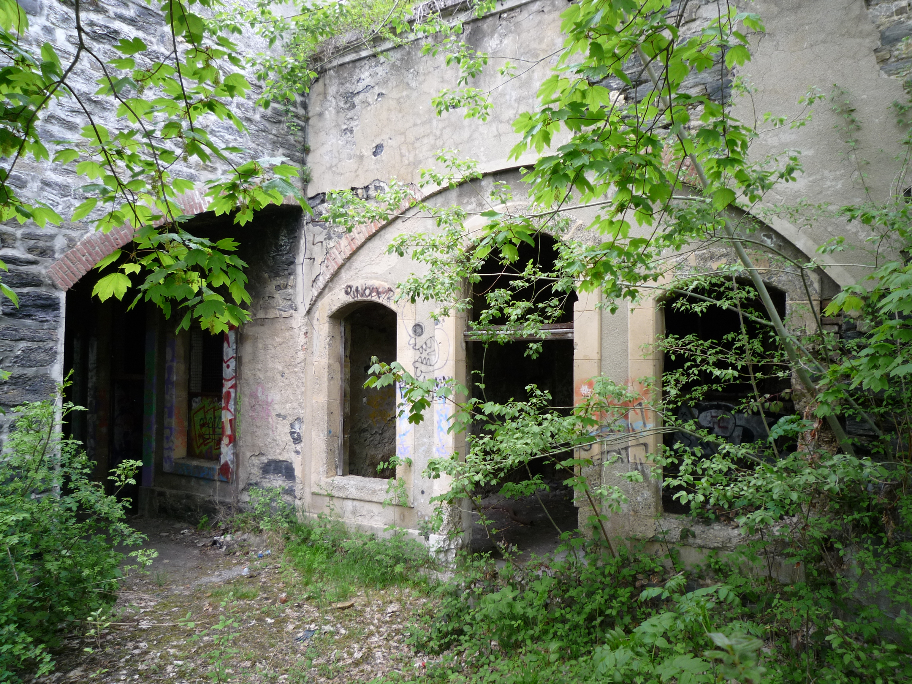 Une casemate du Fort des Quatre Seigneurs - vue de l'extérieur.